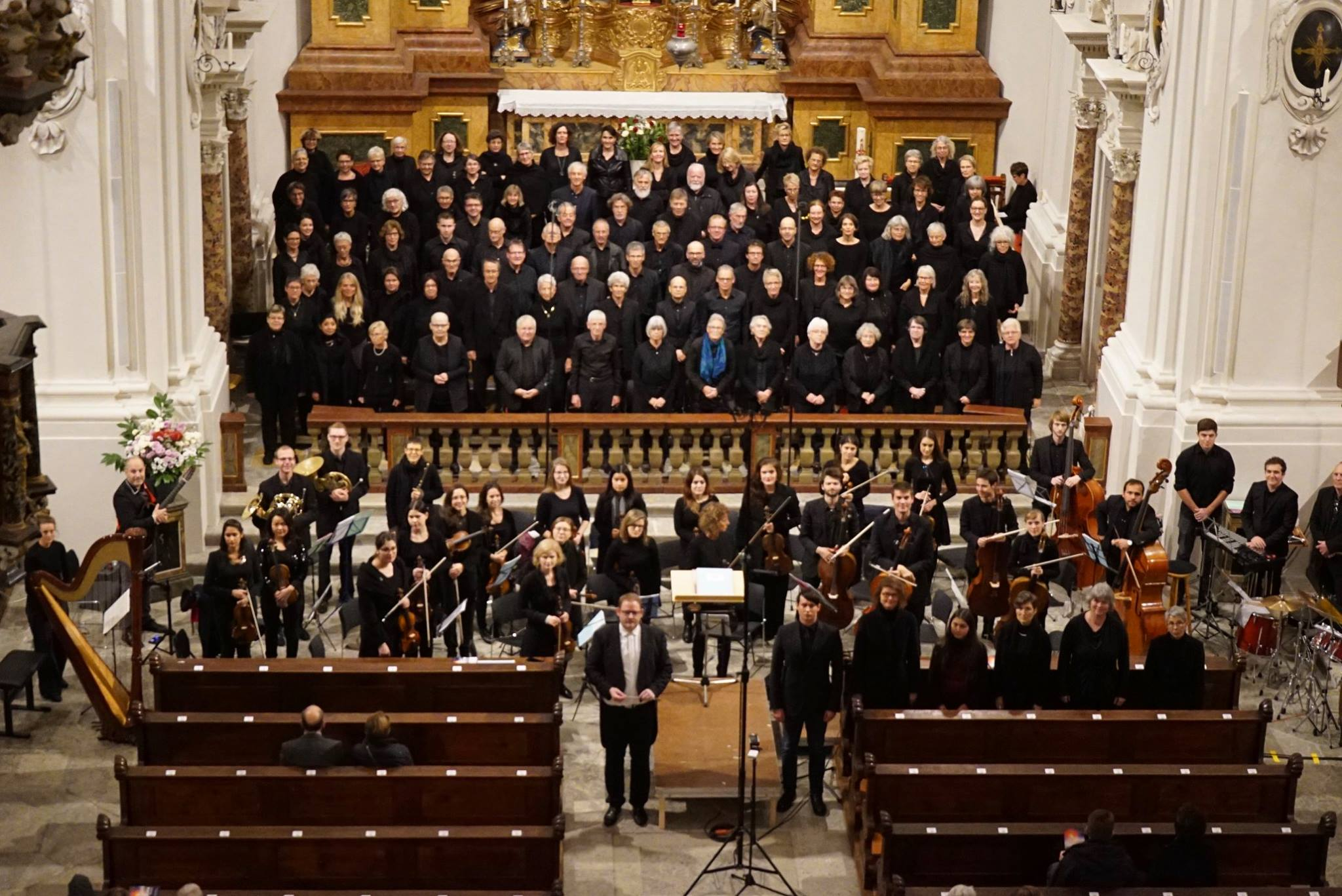 Drei Chöre führten im November 2017 in Murten, Basel und Solothurn mit Solisten und einem grossen Orchester das REQUIEM vom zeitgenössischen walisischen Musiker und Komponisten Karl Jenkins sowie als Welt-Uraufführung ein neu komponiertes REQUIEM des jungen Komponisten Raphael Sommer aus Basel auf. Chöre: Ref. Kirchenchor Murten Kath. Kirchenchor Langendorf Projektchor REQUIEM Basel